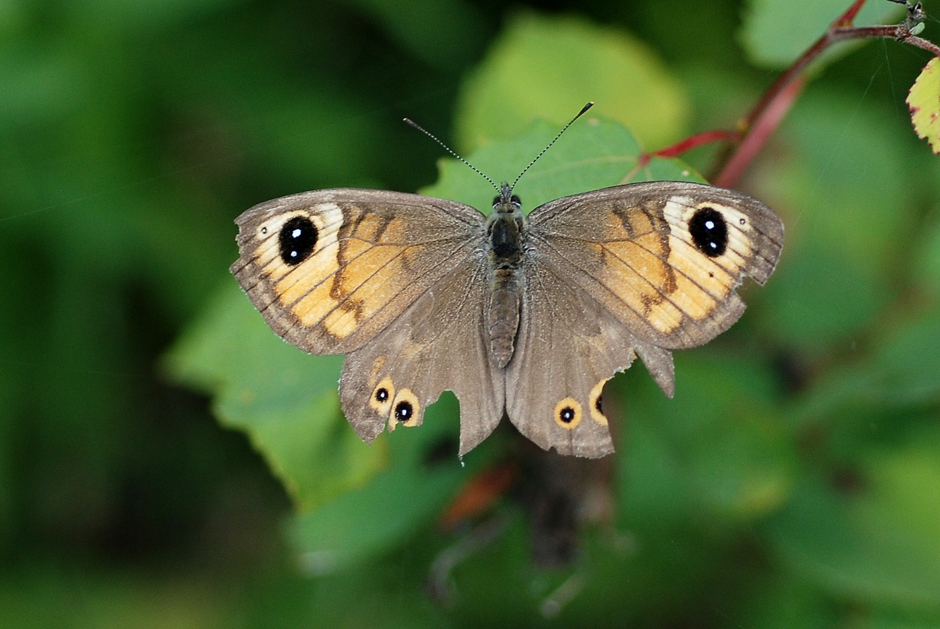 Lasiomata maera